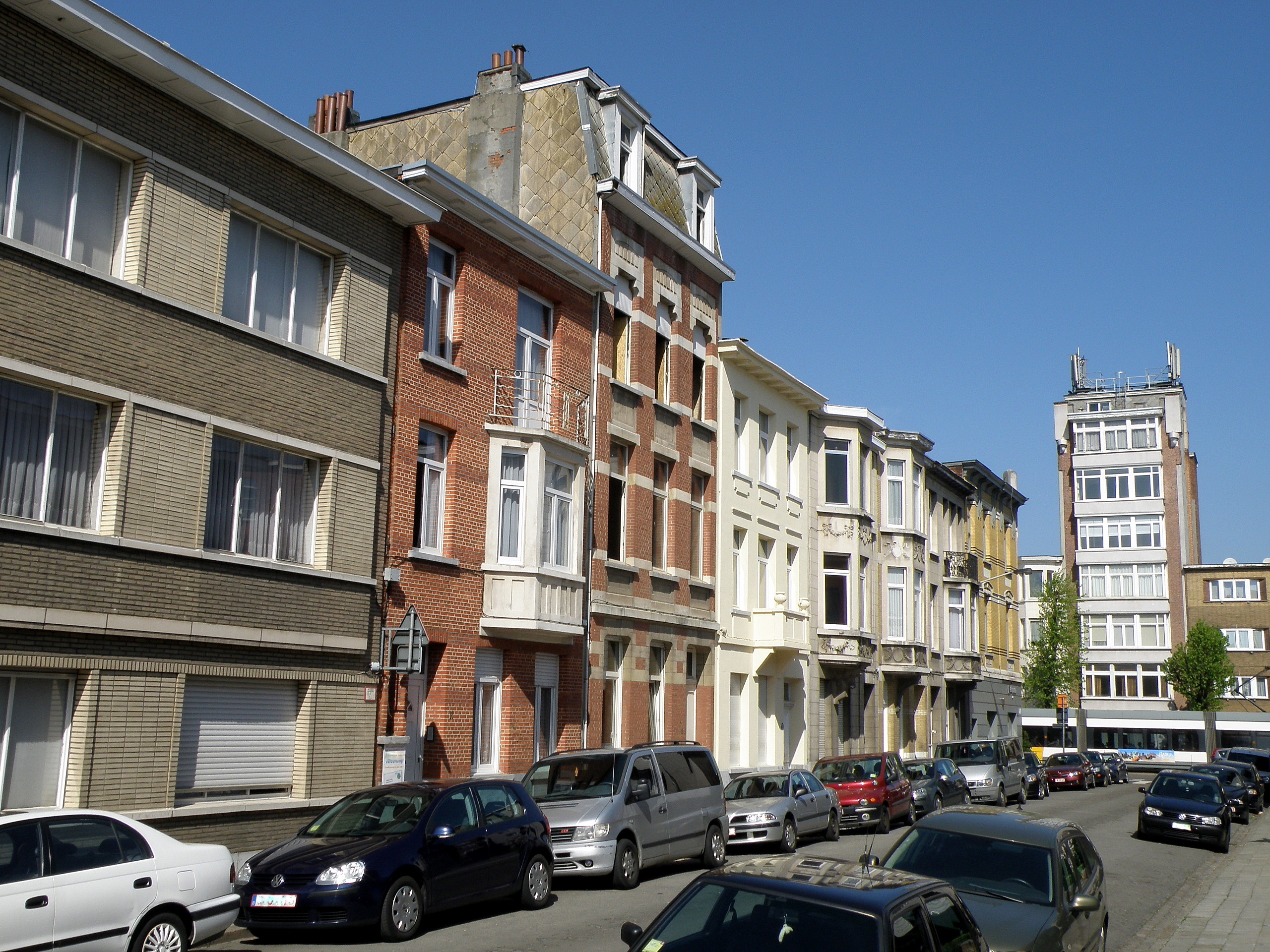 Apollostraat (blikrichting N., tram in Gitschotellei)